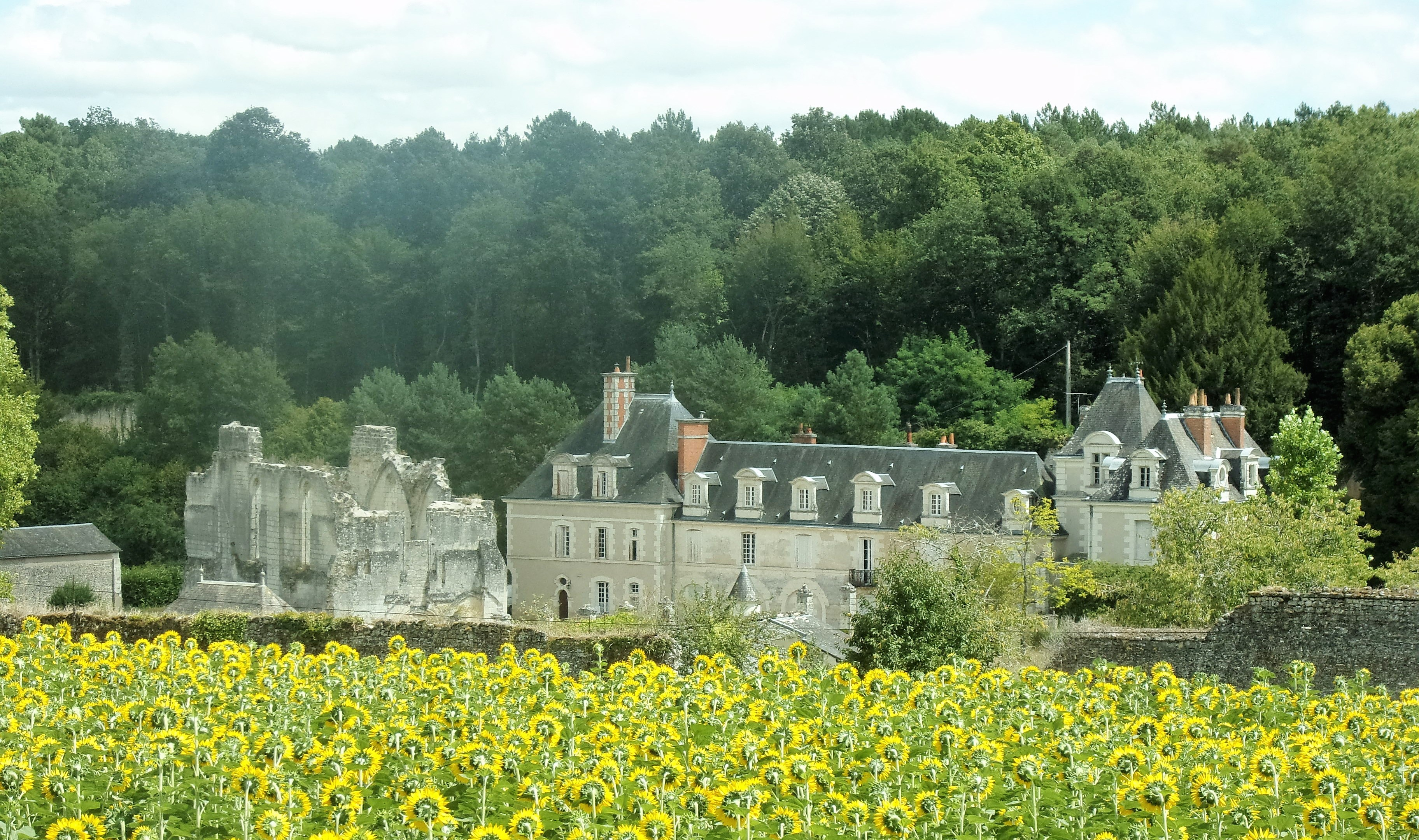 Panorama général de la chartreuse (ruines de l'abbatiale et communs modernes)